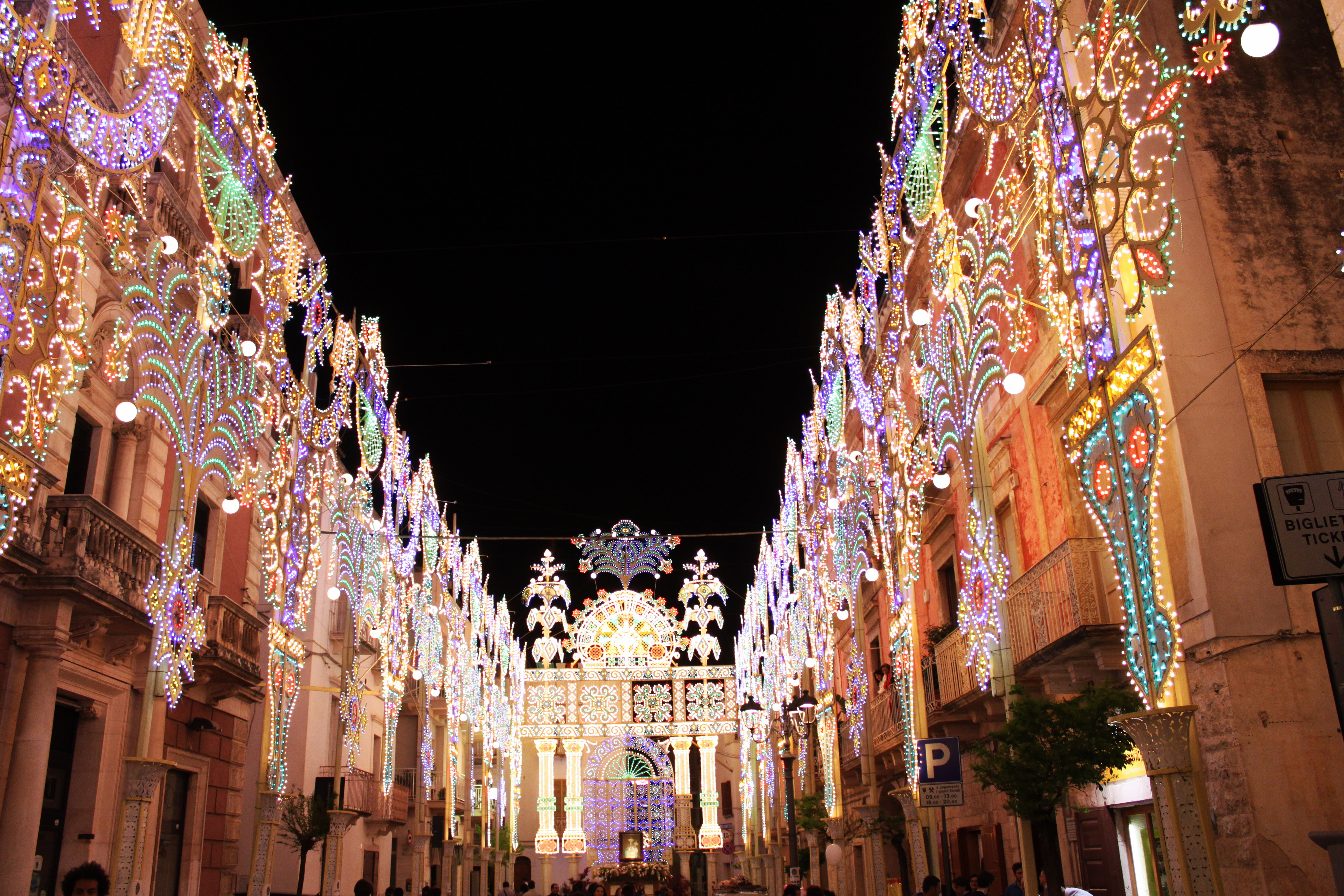 Luminarie della Festa d'Aprile di Castellana Grotte in Corso Italia, foto di Giandomenico Laera, 2012)